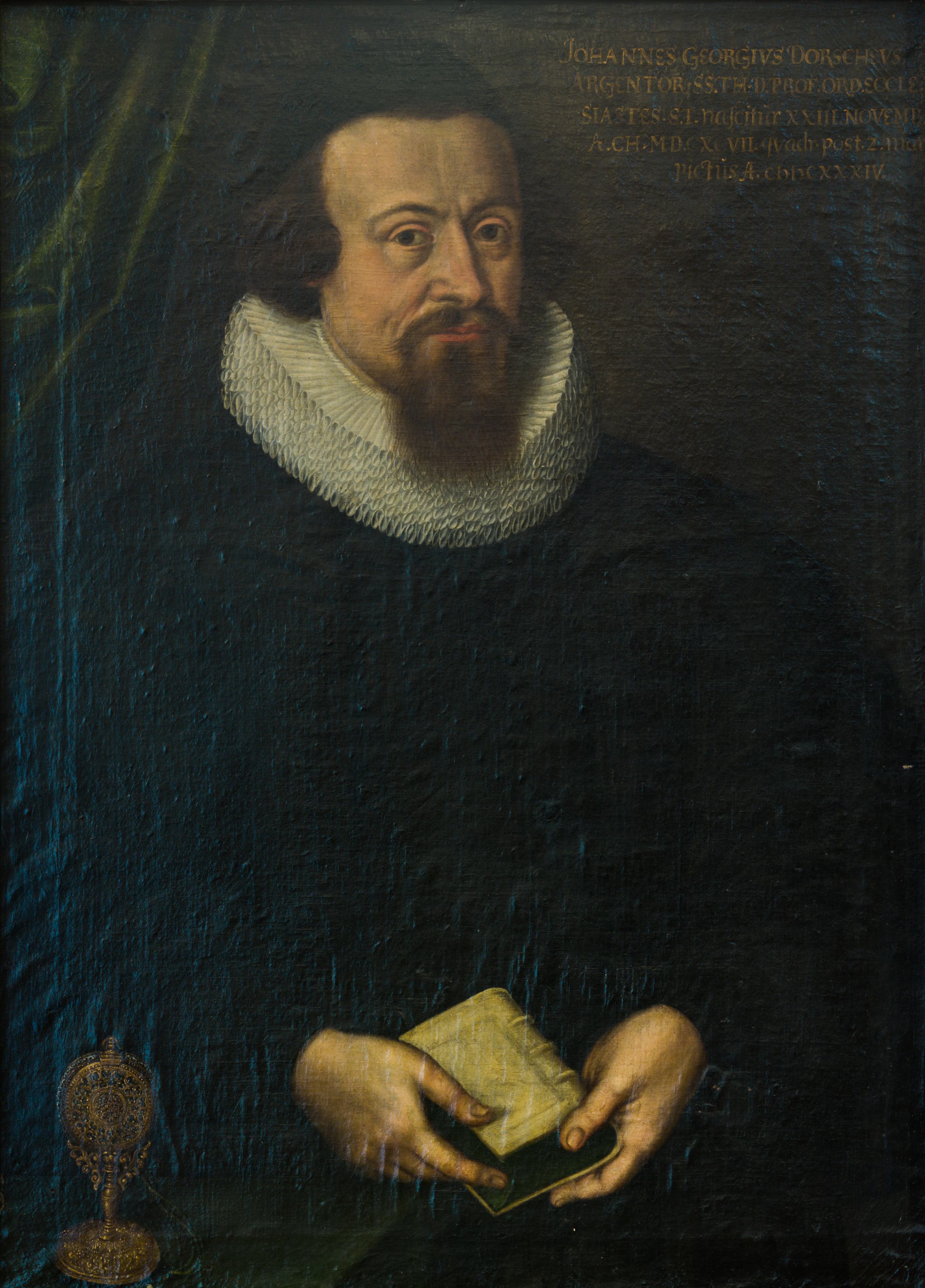 Jean Georges Dorsch (1597-1659), professeur de théologie protestante à l'Université de Strasbourg. Portrait à l'huile sur toile peint en 1634. Collections du Chapitre de Saint-Thomas à Strasbourg, salle Capiton